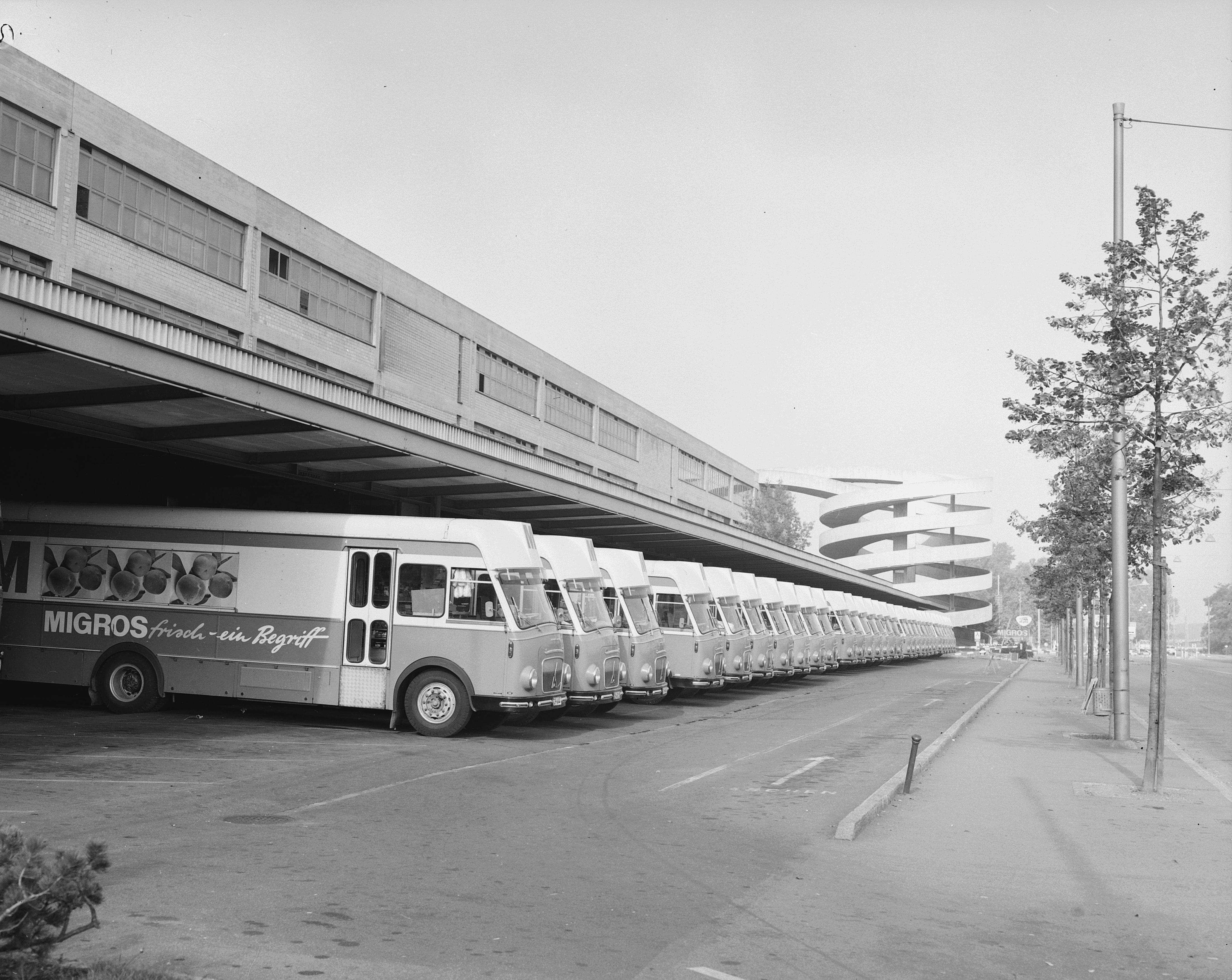 Parkierte Migros-Verkaufswagen Magirus-Deutz in der Betriebszentrale Zürich-Herdern; Werbung: Migros Frisch - ein Begriff